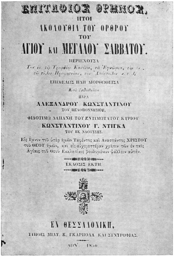 Επιτάφιος Θρήνος, ήτοι ακολουθία του Όρθρου και του Αγίου και Μεγάλου Σαββάτου. Περιέχουσα τον εν των Τριωδίω Κανόνα, τα Εγκώμια, την εν τω τέλει Προφητείαν, τον Απόστολον κ.τ.λ. Επιμελώς ήδη διορθωθείσα και εκδοθείσα παρά Αλεξάνδρου Κωνσταντίνου του Πελοποννησίου, φιλοτίμω δαπάνη του εντιμοτάτου κυρίου Κωνσταντίνου Γ. Ντίγκα του εκ Ναούσσης. Εις ύμνον του υπέρ ημών Ταφέντος και αναστάντος Χριστού του Θεού ημών, και εις ευχερεστέραν χρήσιν των εν ταις Αγίαις του Θεού Εκκλησίαις βουλομένων ψάλλειν αυτήν. Έκδοσις έκτη. Εν Θεσσαλονίκη τύποις Μιλτ. Κ. Γκαρμπολά και συντροφίας. ΑΩΝ -1850.